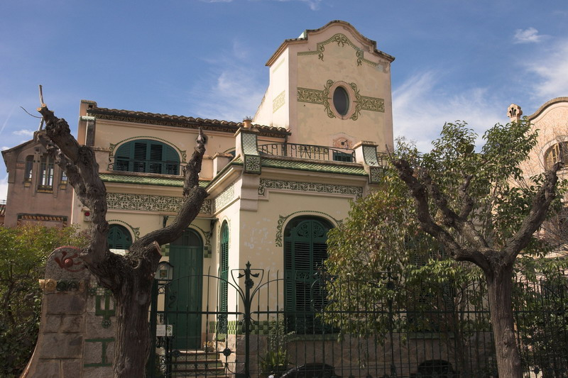 Casa Cecília Reig "la Bombonera"(la Garriga-Vallès Oriental-Catalunya), obra de Manuel Raspall 1910